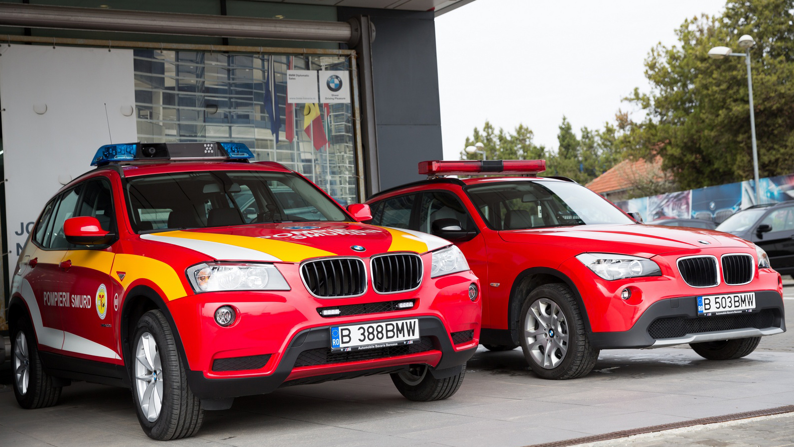 Smurd ambulances Romania